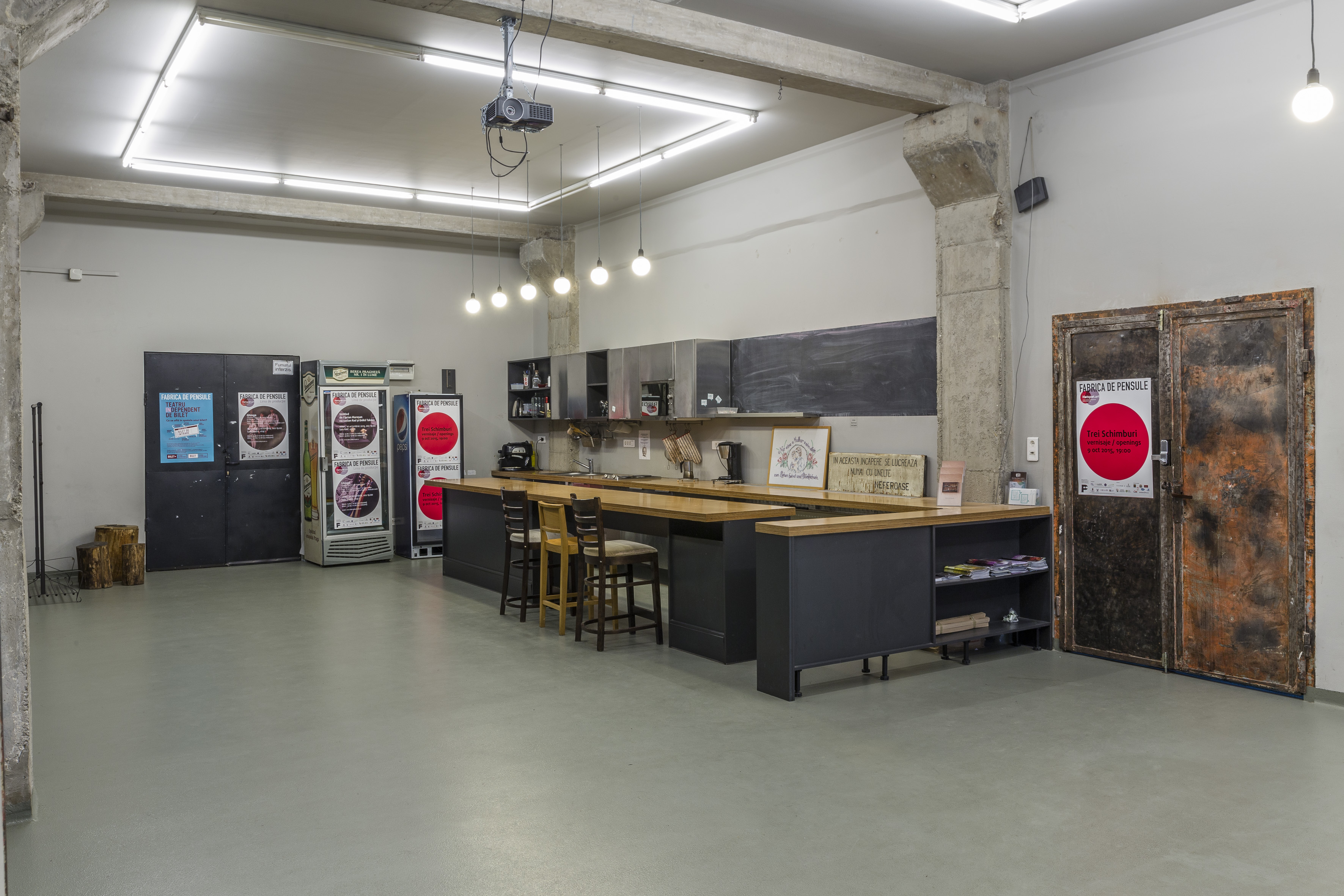 Barul/ Bucătăria de la etajul 1